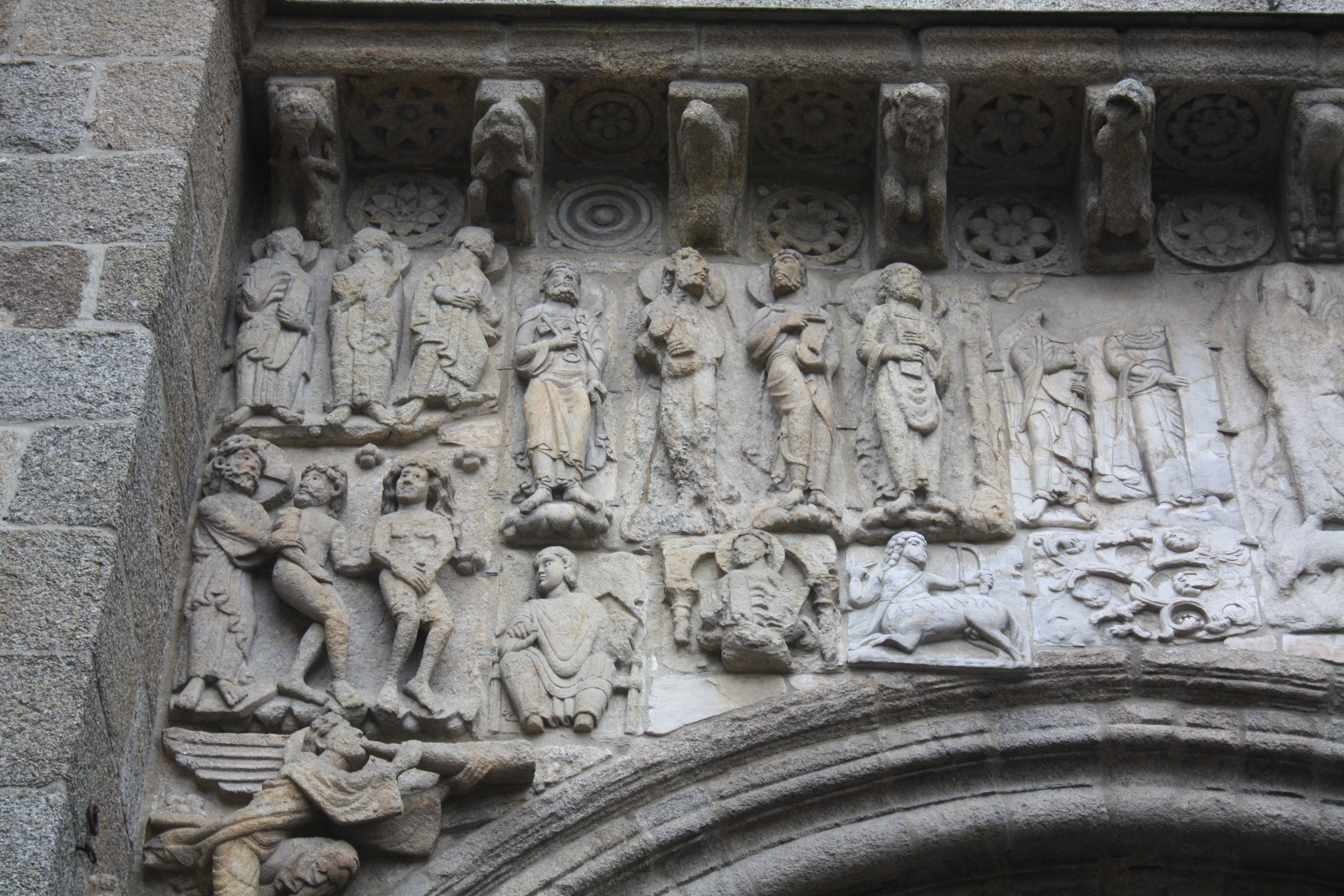 Detalle do tímpano esquerdo do Pórtico das Praterías. A esquerda, o relevo da Expulsión do Paraíso; no centro, o símbolo de Saxitario